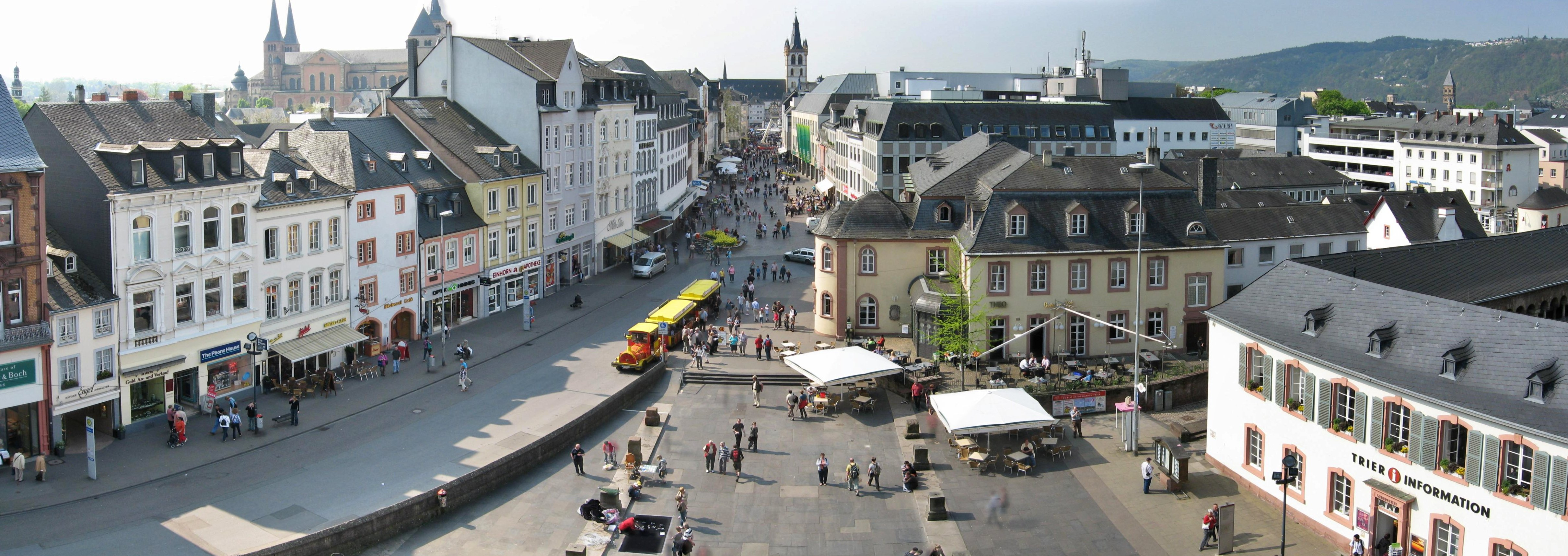 Blick von der Porta Nigra